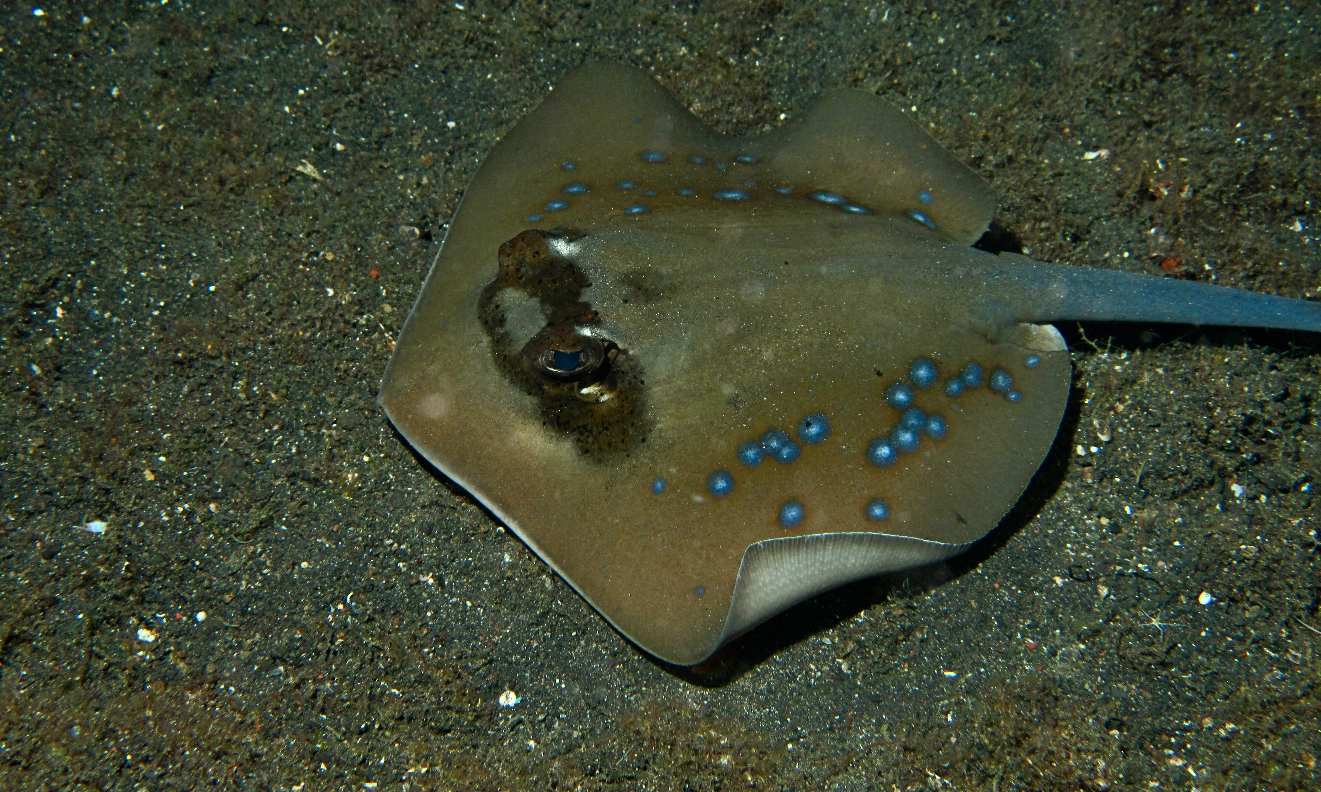 Jahir, Lembeh Strait, Sulawesi, INDONESIA